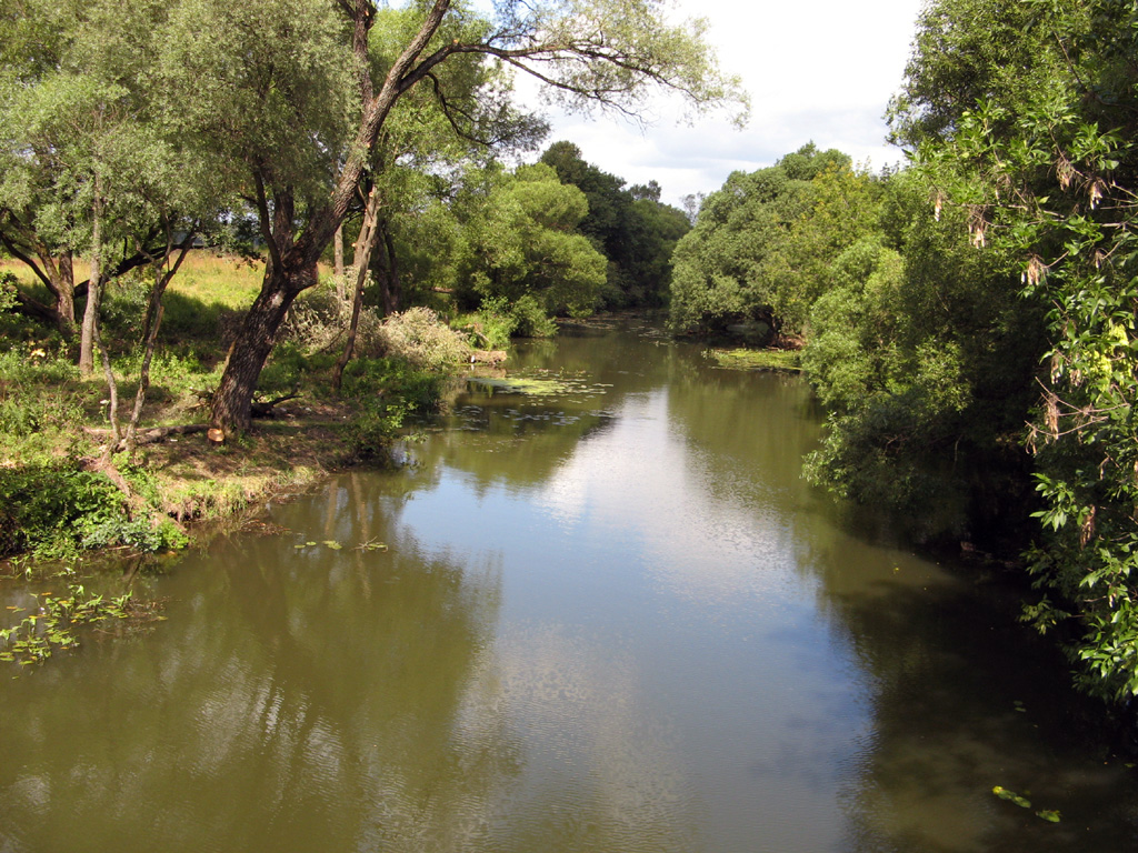 река Лопасня в районе г. Чехов (Московская область); Lopasnya River in Chekhov (Moscow Oblast)